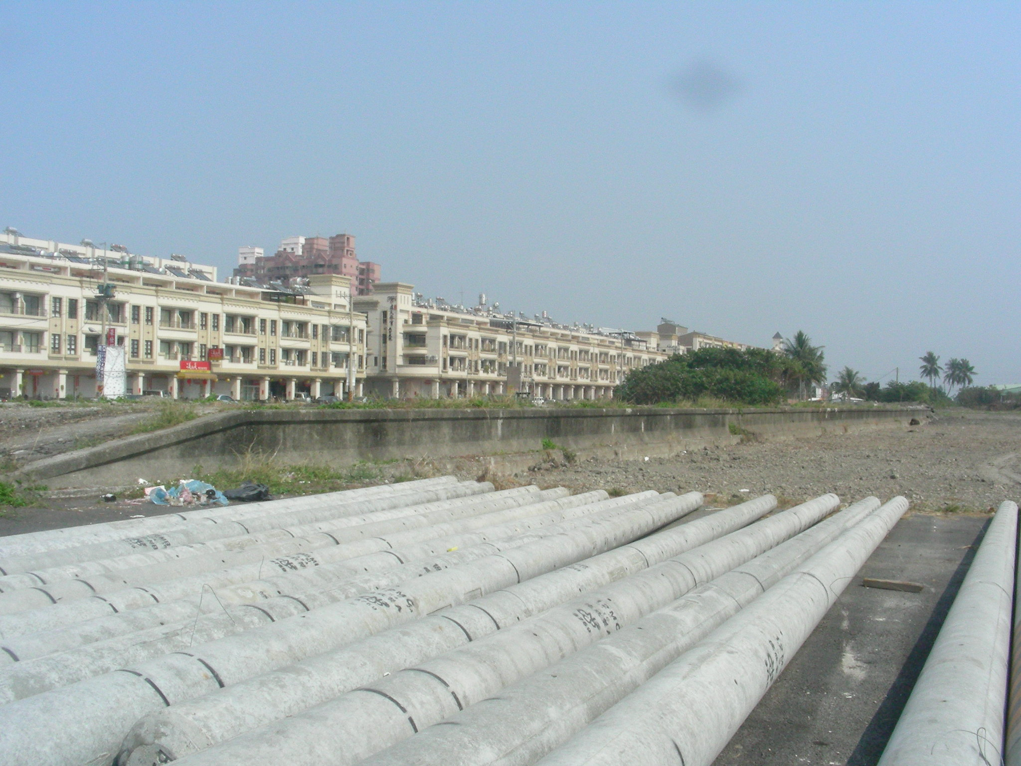 東港站站場 / 只剩月台… Abandoned Tungkang Station